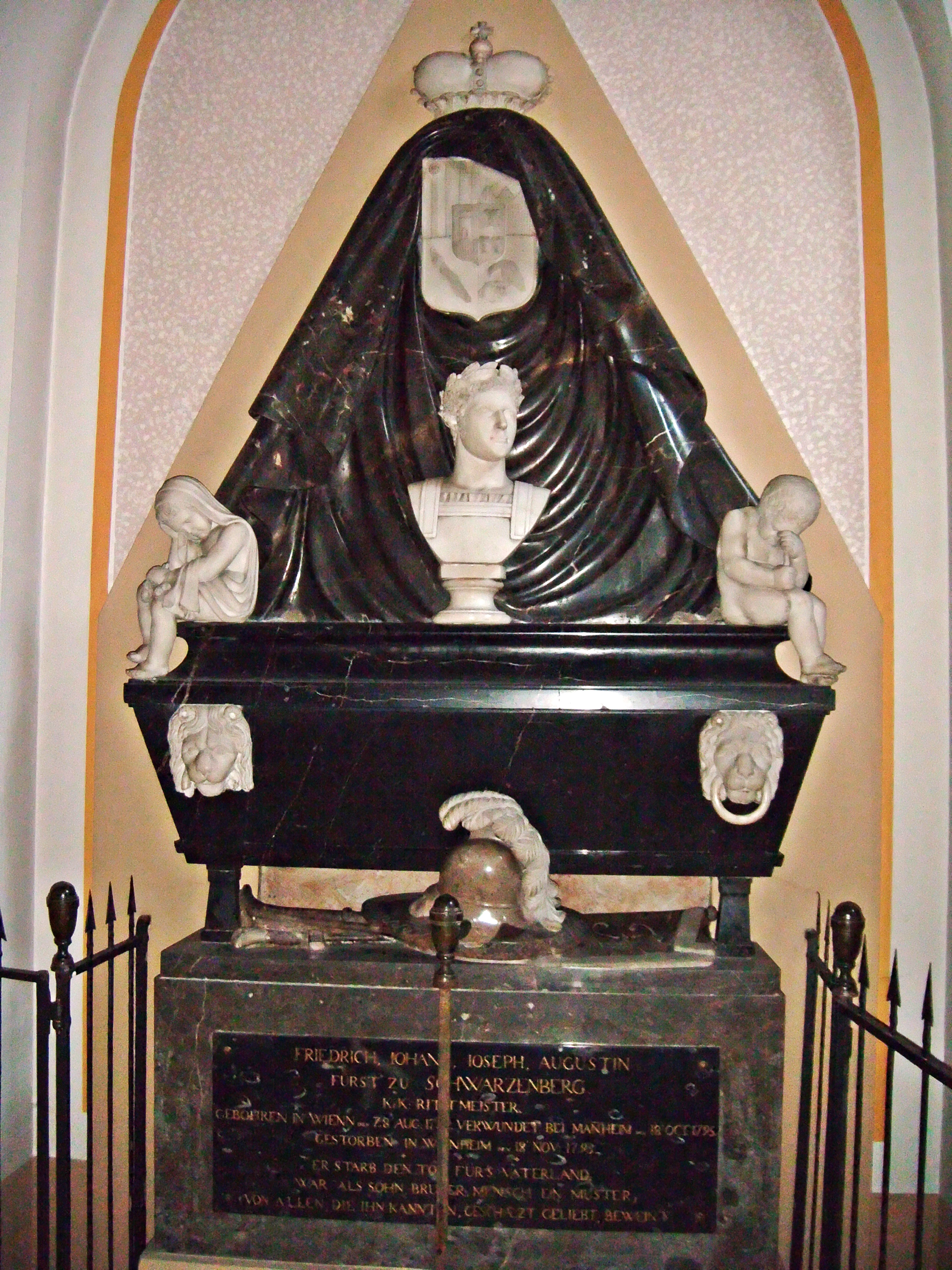 Grabmal des Fürsten Friedrich Johann Nepomuk Joseph August von Schwarzenberg (1774-1795), St-Laurentius-Kirche, Weinheim, Baden-Württemberg; geschaffen von Maximilian Joseph Pozzi (1770-1842), aus Mannheim